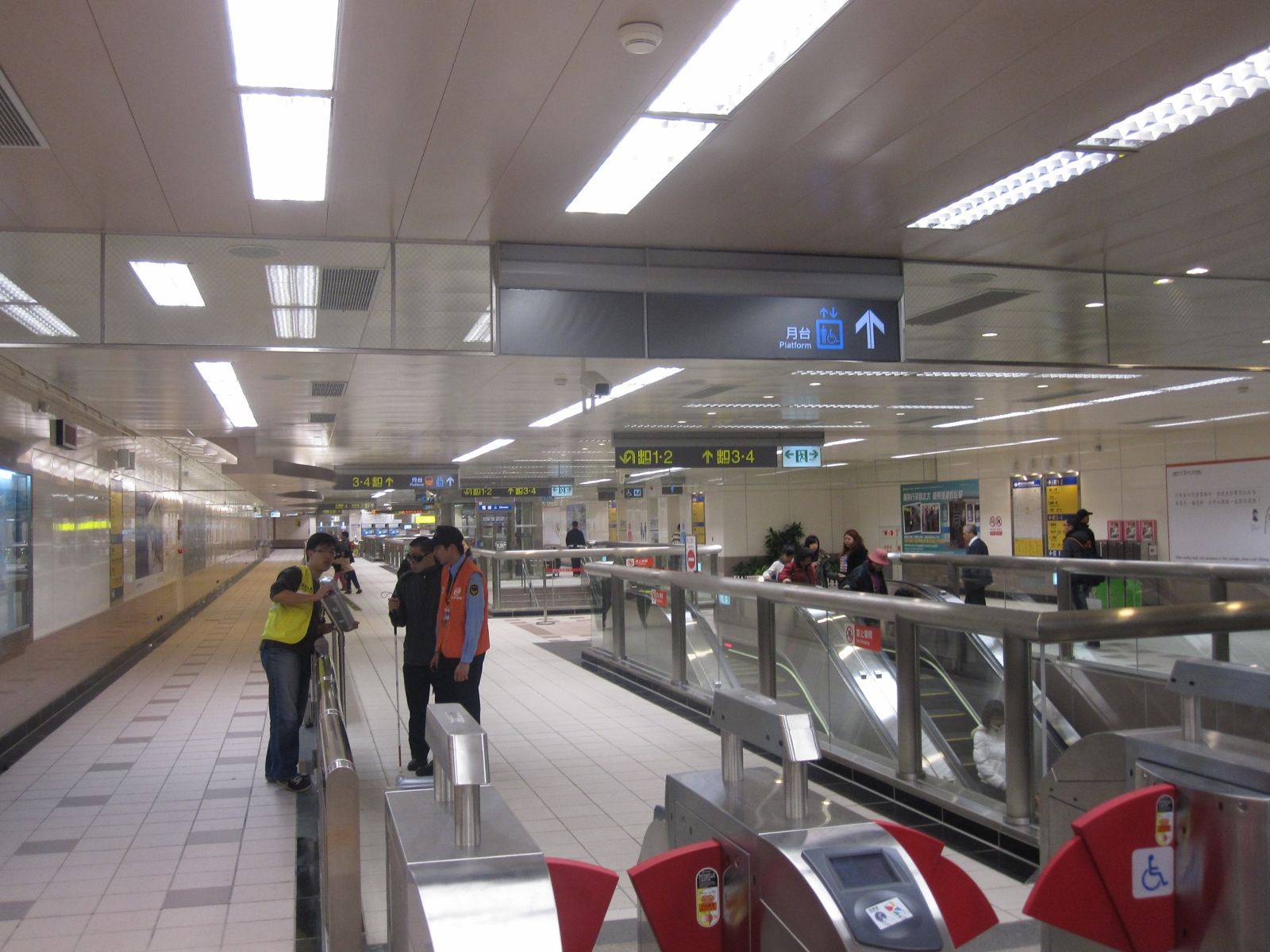 輔大站地下一樓穿堂層